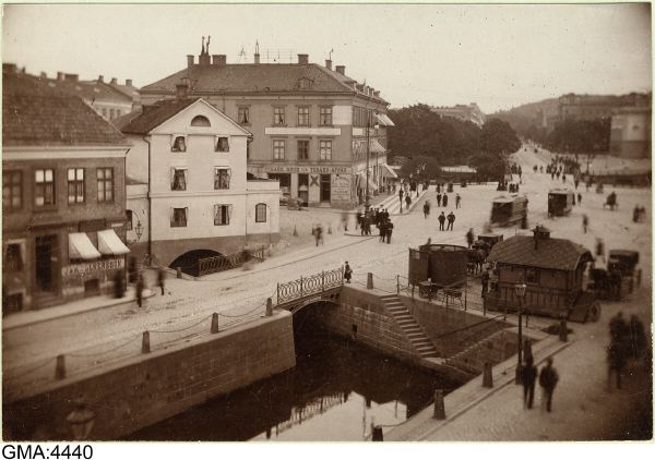 Kungsportsplatsen och Reservoirbron (Reservoarbron) över Östra Hamnkanalen i stadsdelen Inom Vallgraven i Göteborg.